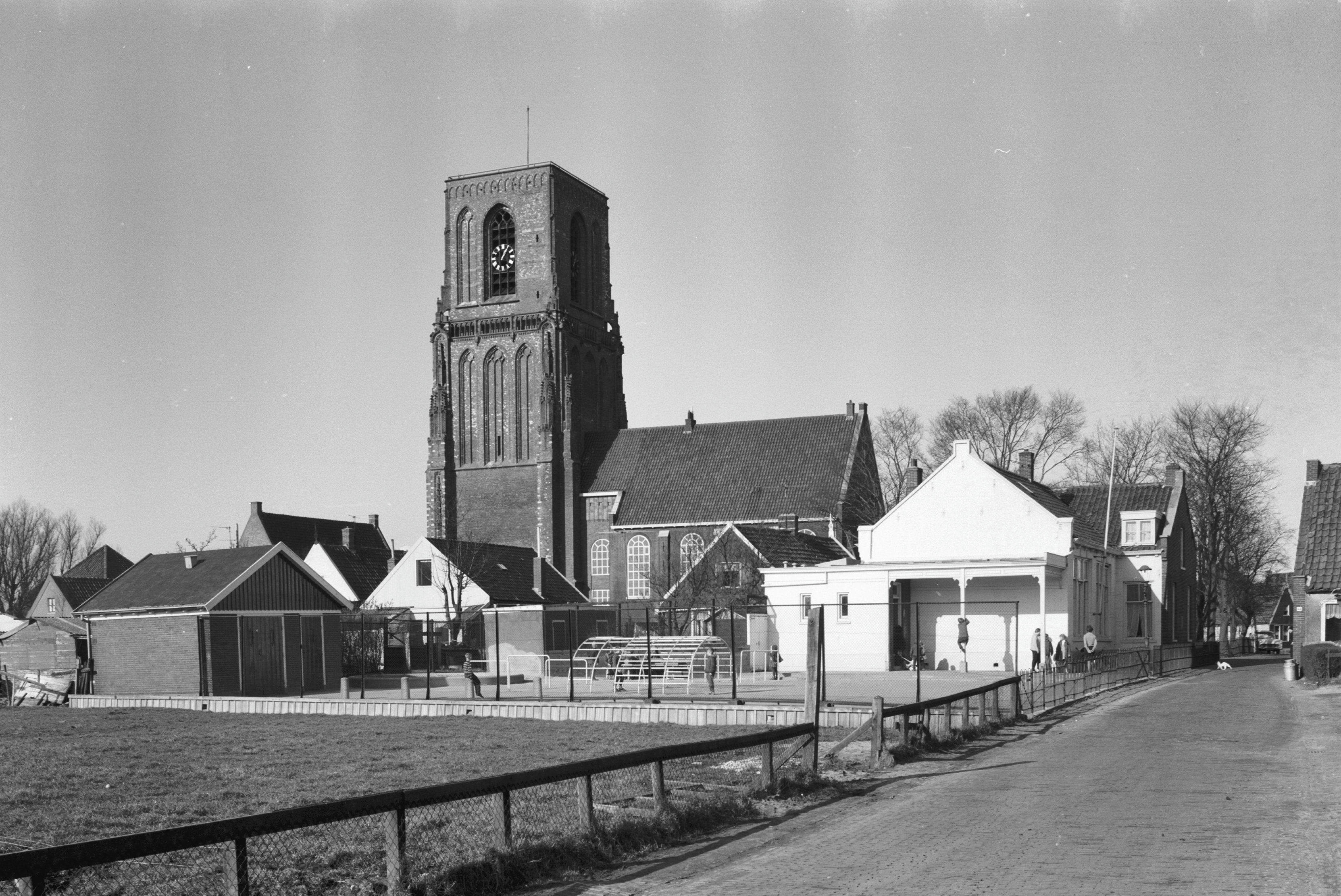 Overzicht dorpscentrum vanuit het zuidoosten, met school en kerk